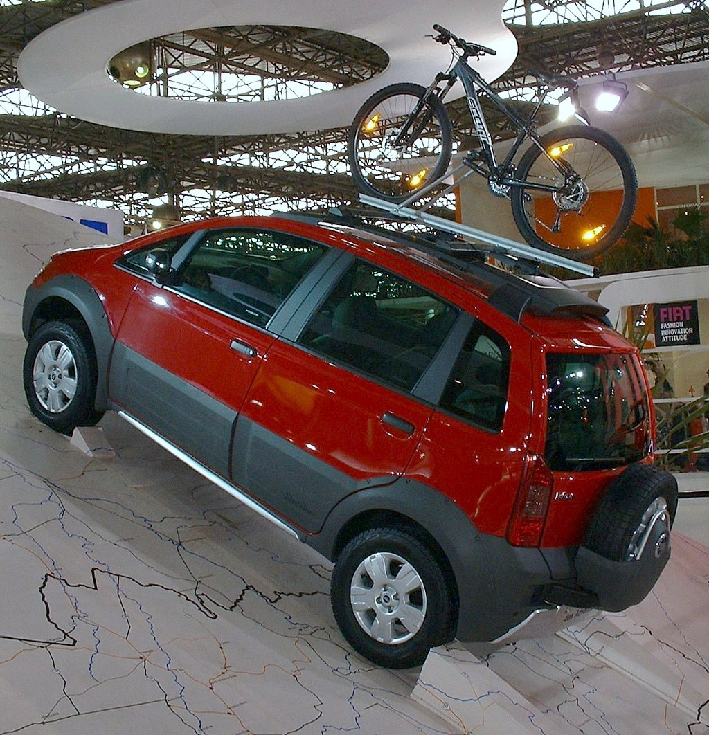 Uploading some old photos. Fiat Idea Adventure made by in Betim, Brasil. Salão Internacional do Automóvel 2006, São Paulo.